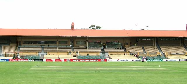 George Giffen stand at Adelaide Oval